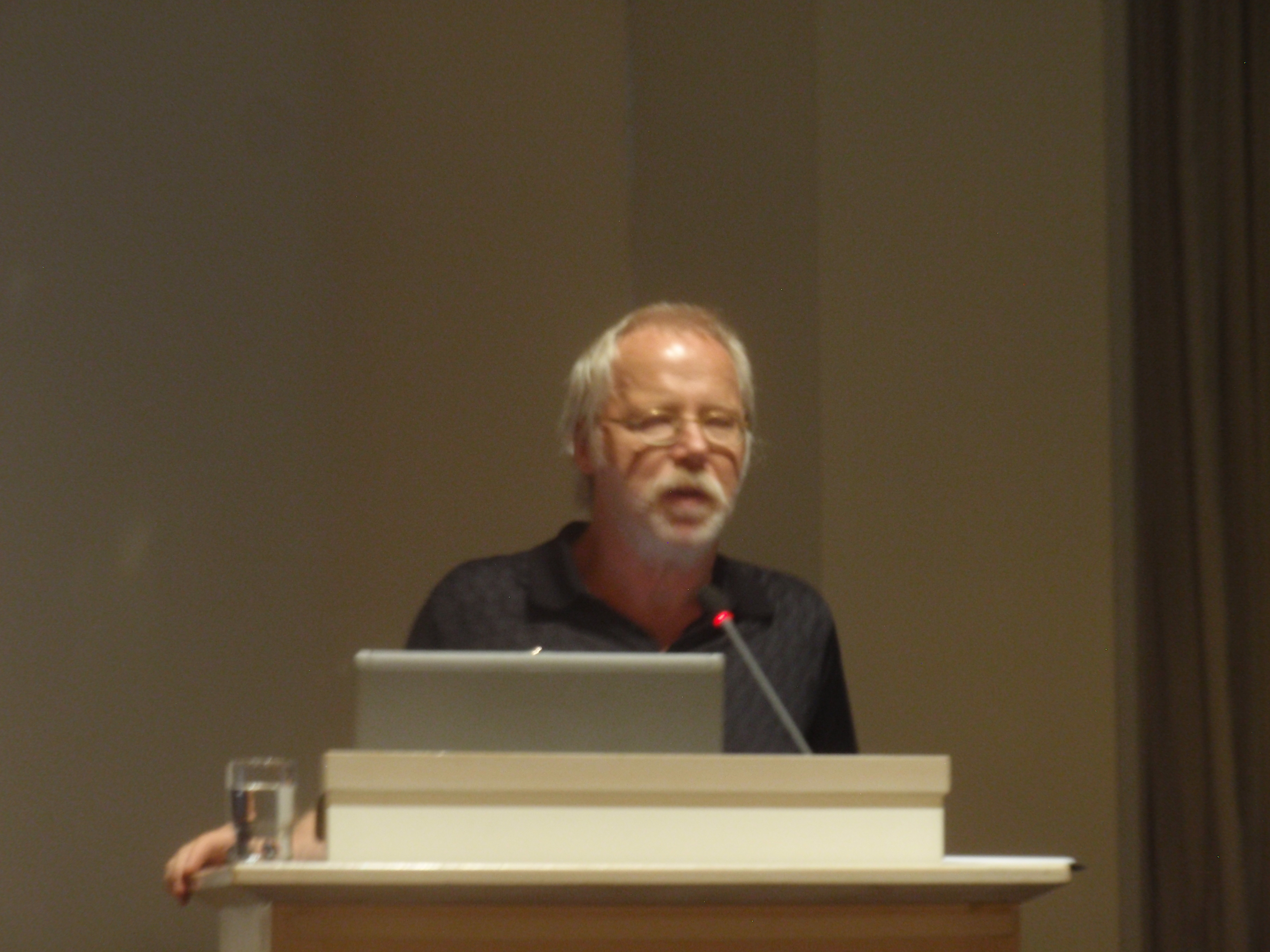 Prof. Dr. Heiner Keupp (* 16. Juni 1943 in Kulmbach), Sozialpsychologe und pensionierter Professor der Ludwig-Maximilians-Universität München, auf dem Kongress "40 Jahre GwG" am 12. Juni 2010 in Mainz